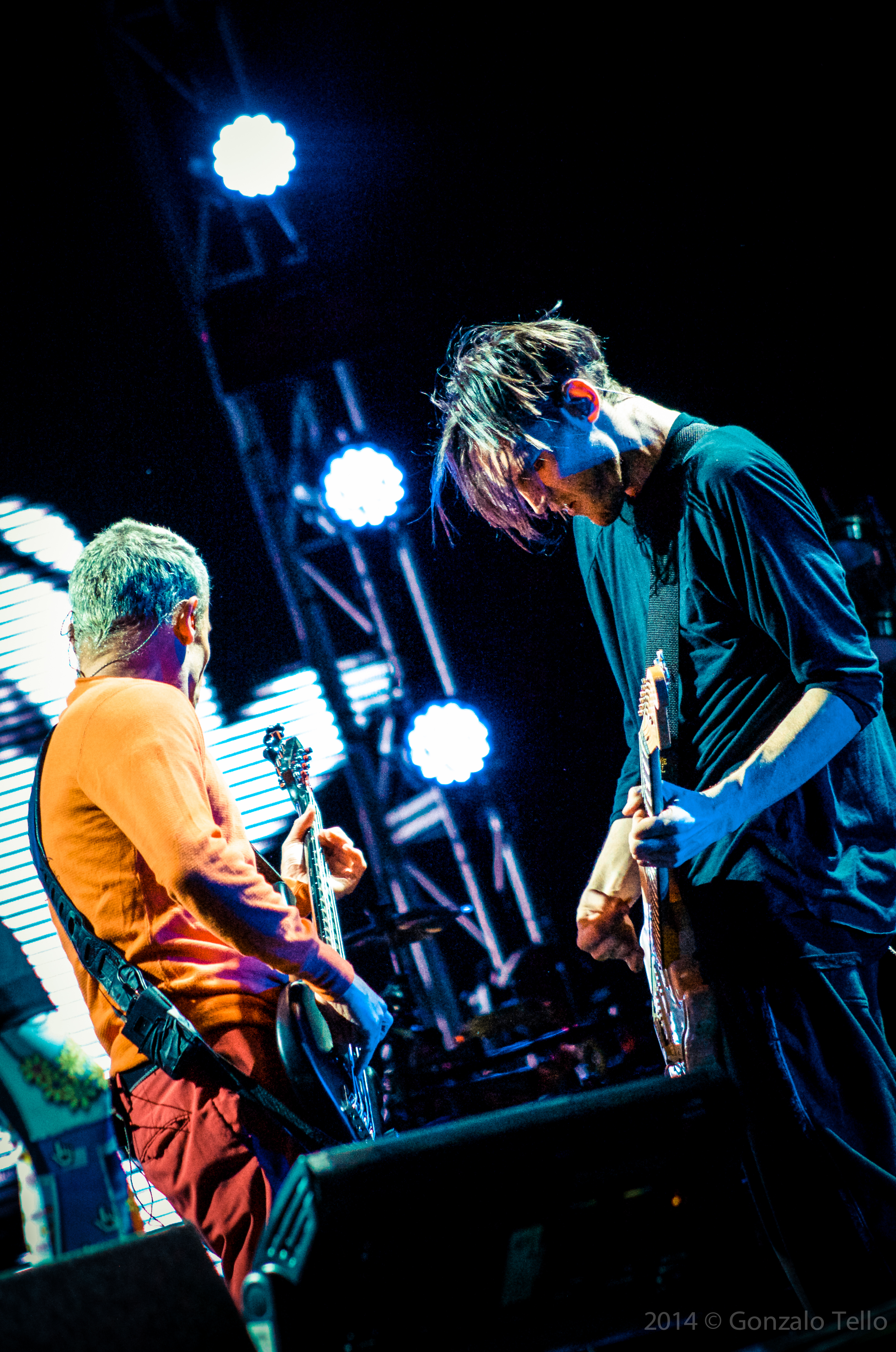 Foto: Gonzalo Tello Todos los derechos reservados